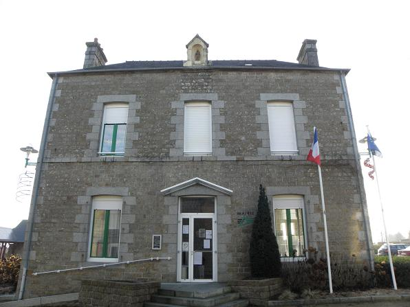 Mairie de Parigné (35).